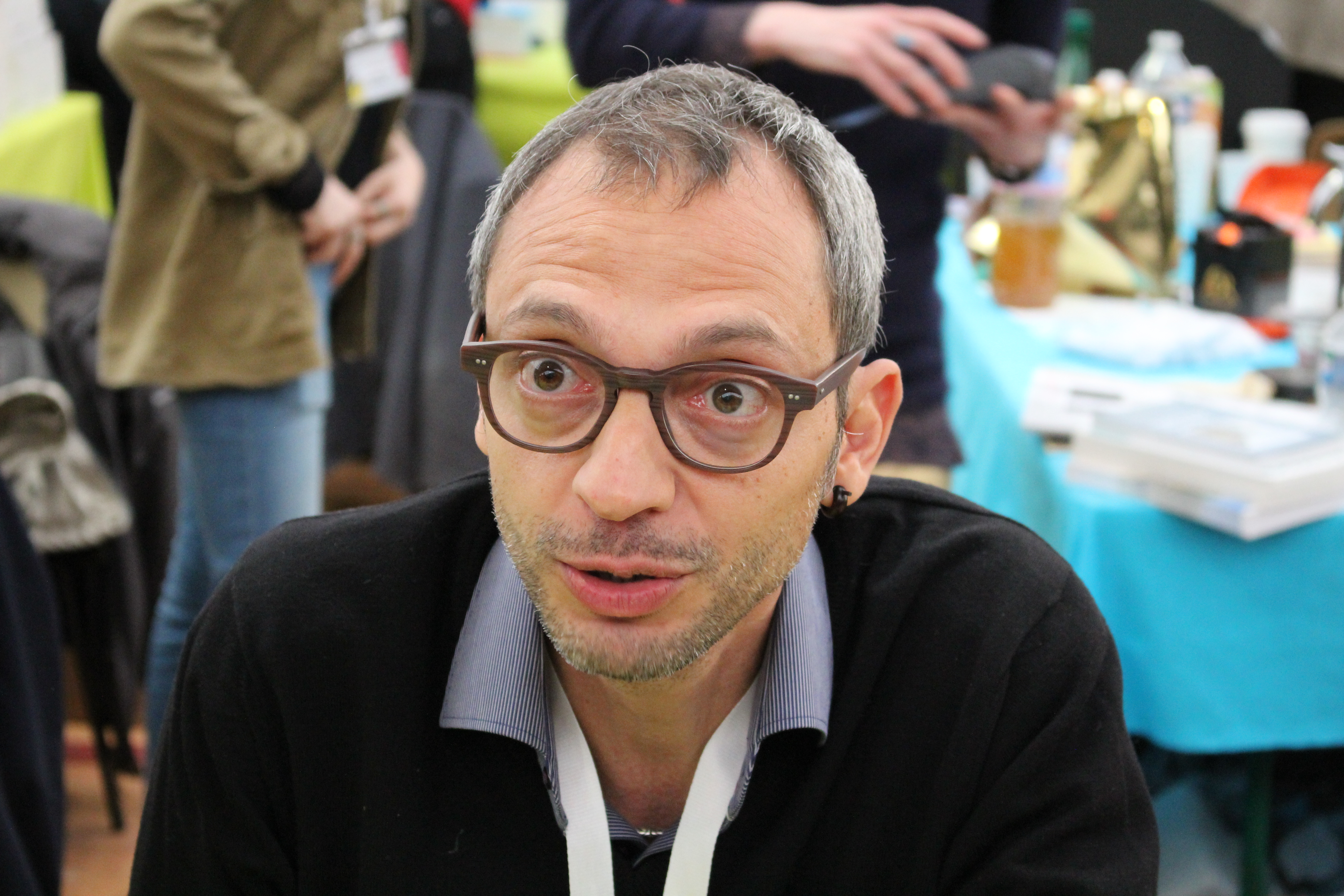 Giampaolo Musumeci - Festival Le Livre à Metz